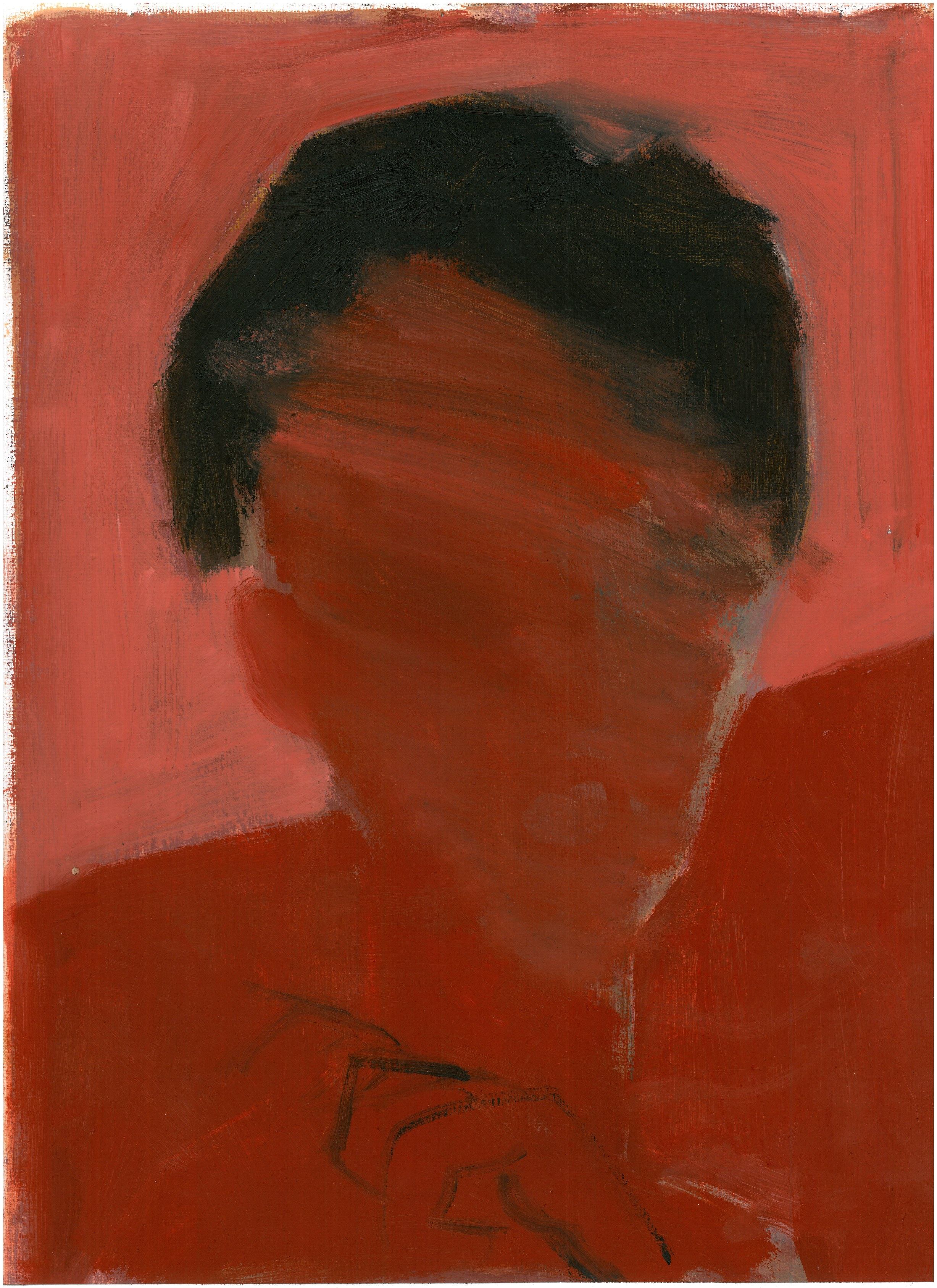 שמן על בד , 42/30 ס"מ, 2015